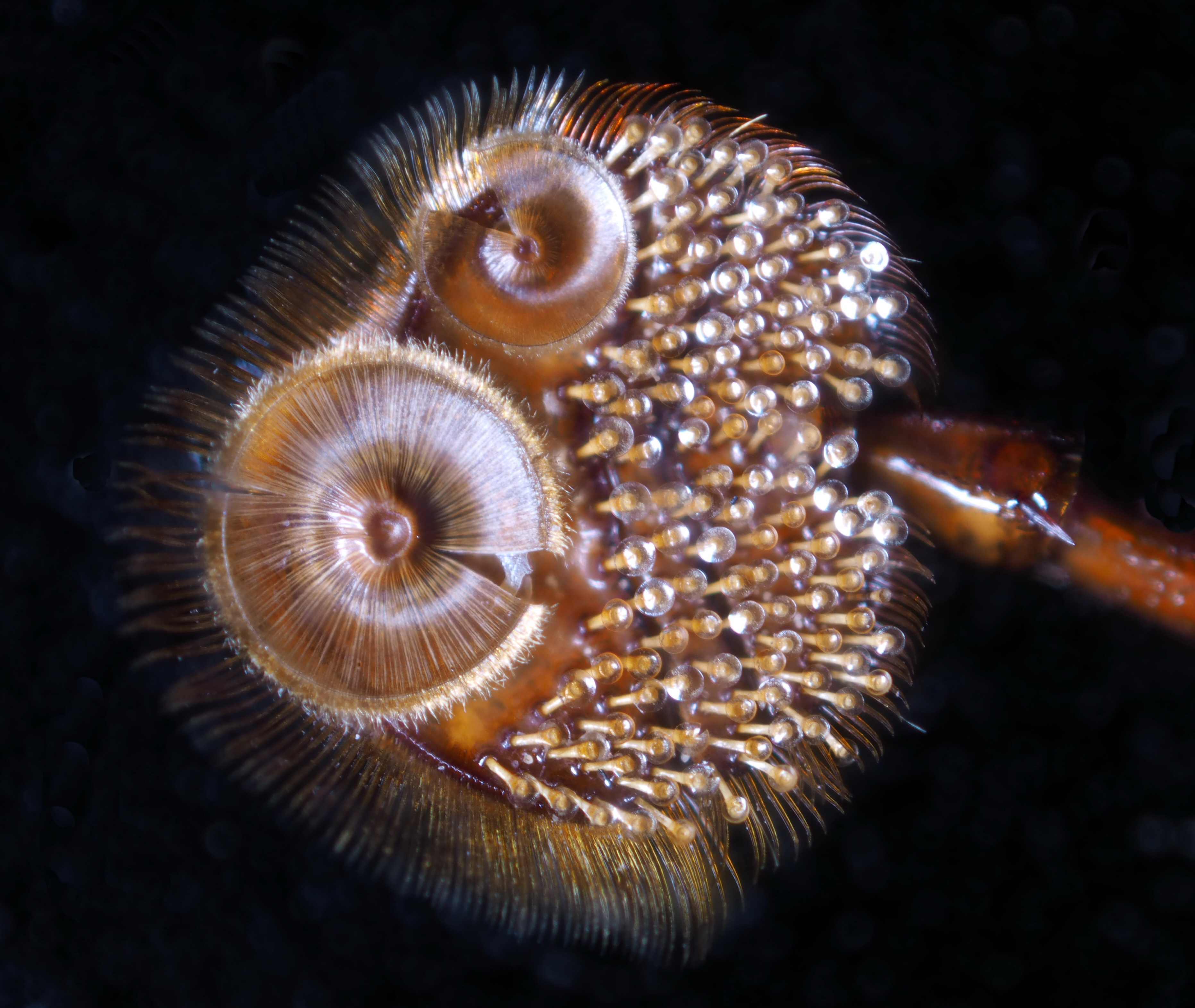 Haftorgane am Fuss des Männchens